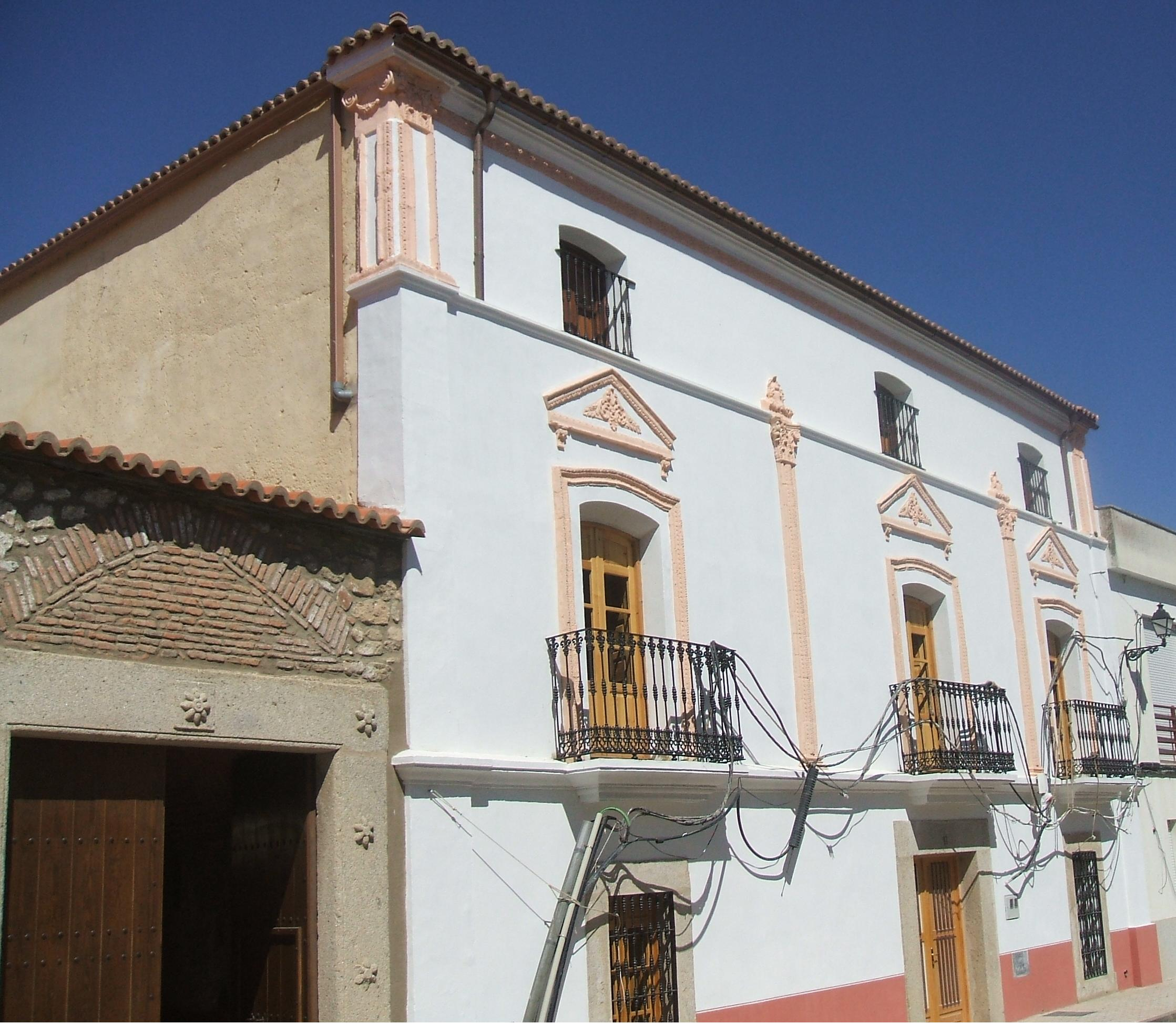 En Navas del Madroño se conserva algún ejemplo de arquitectura popular barroca como la fachada del Cuartel Viejo.